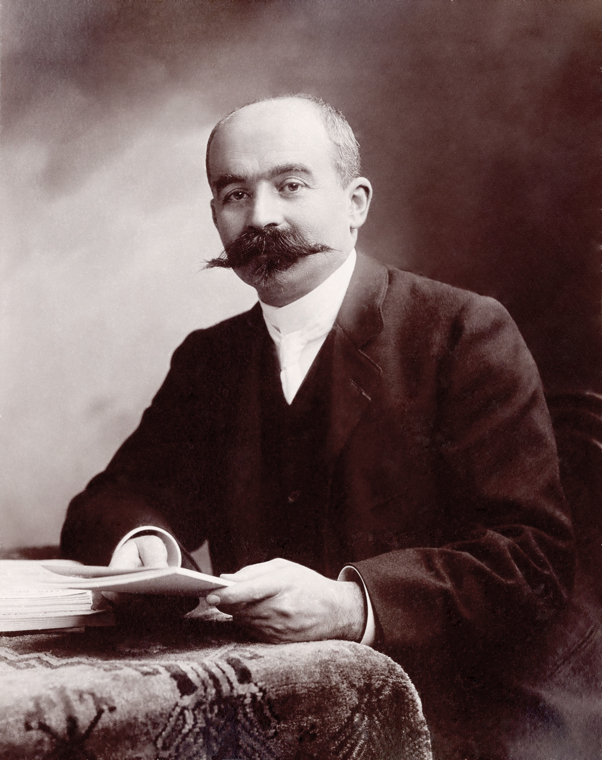 Jean-Albert Gauthier-Villars (1828 - 1898), ingénieur et éditeur français.